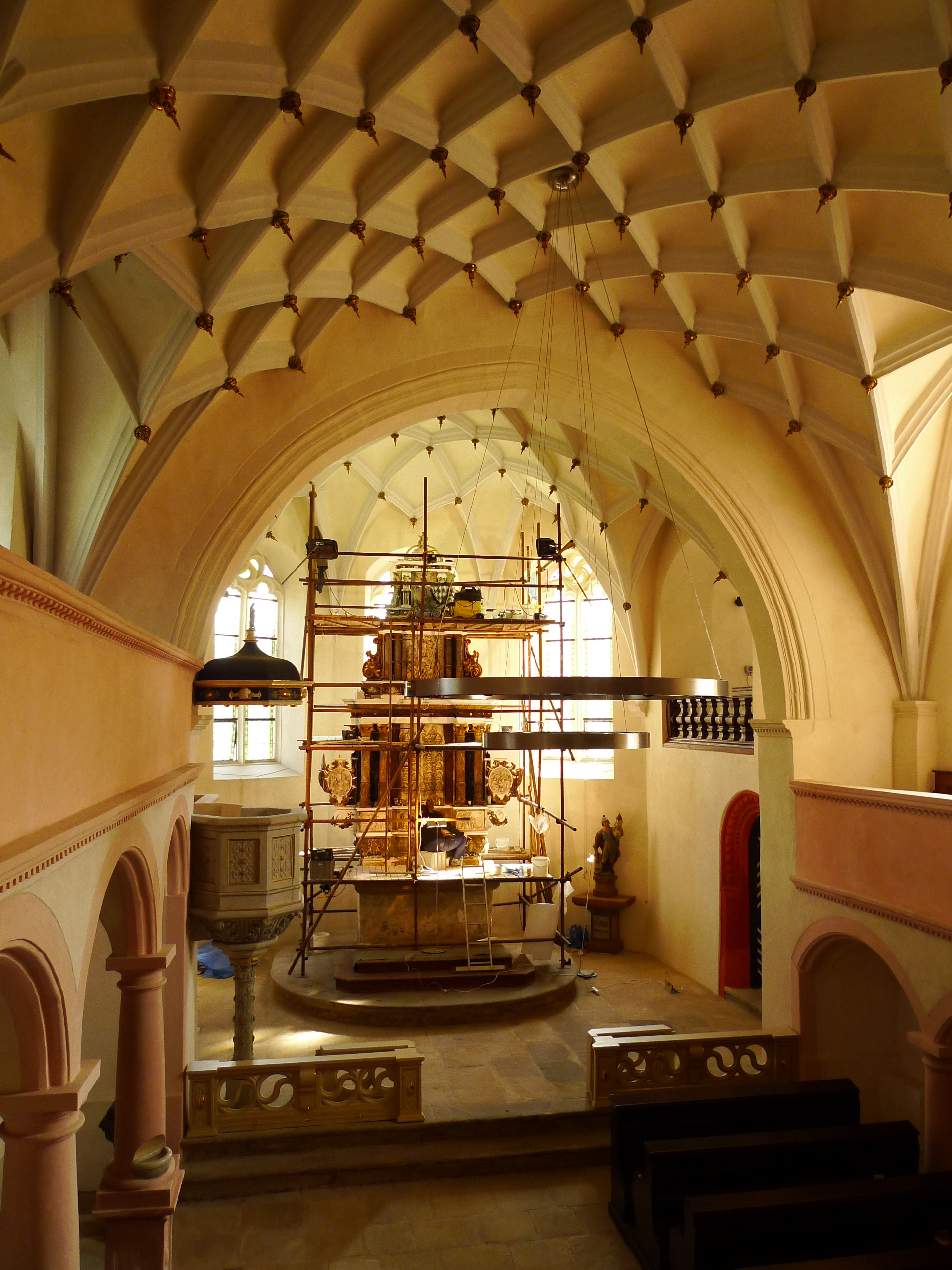 Kostel svatého Floriána, parc. 6, 23/2, Krásné Březno.